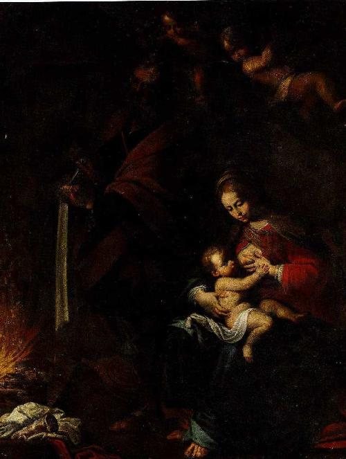 Virgen de la Lechetitle QS:P1476,es:"Virgen de la Leche"